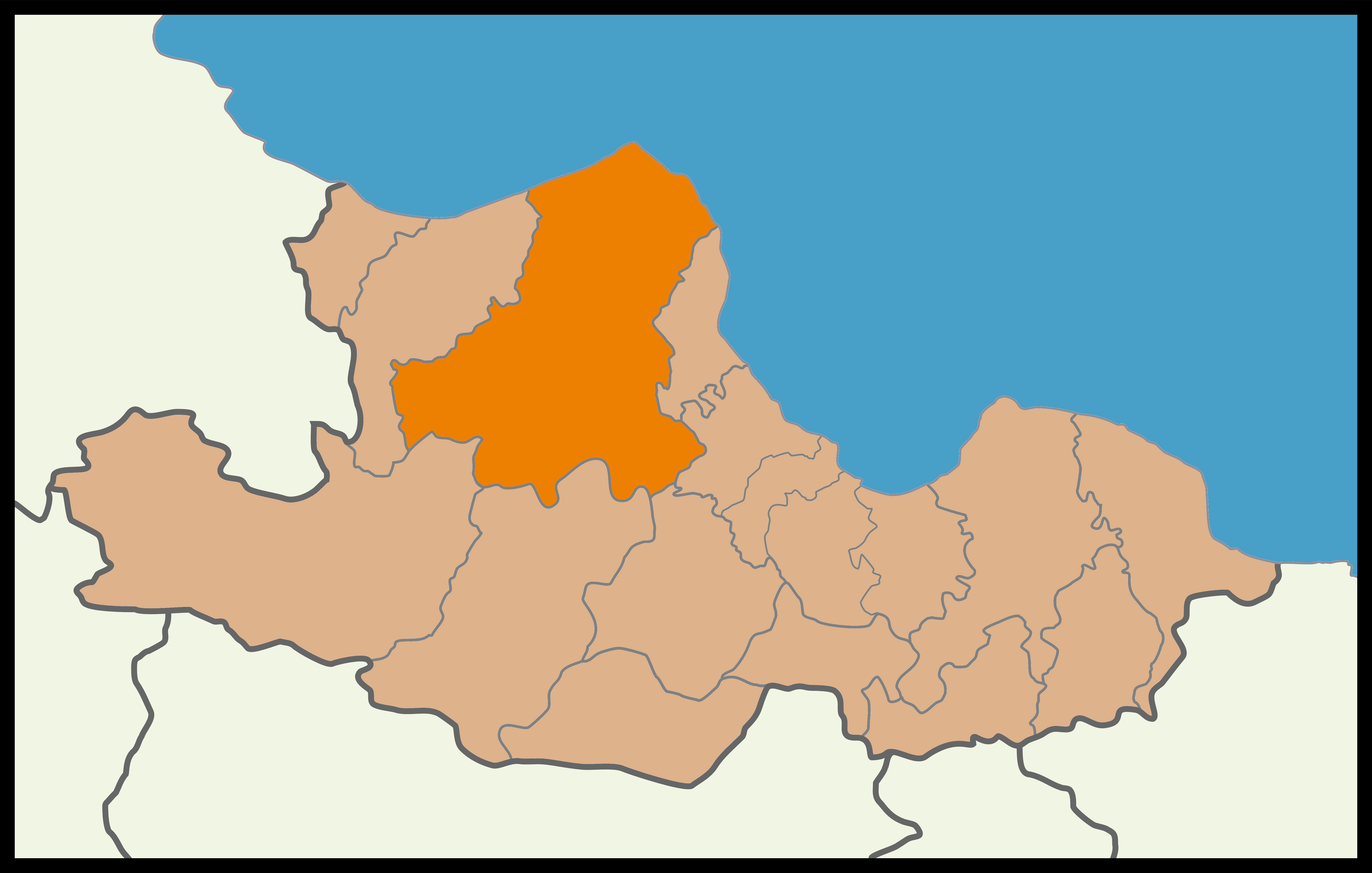 Samsun'un Bafra ilçesinin 2015 Türkiye genel seçimleri haritası.